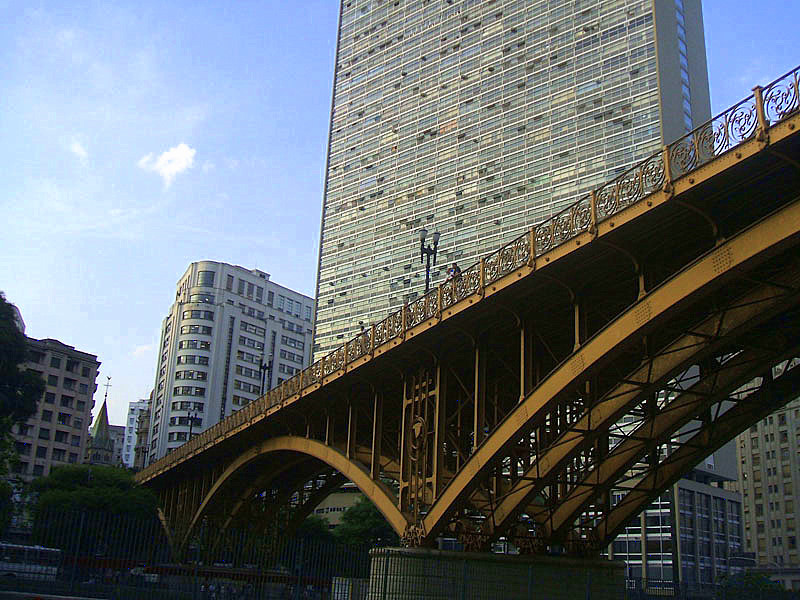 Viaduto Santa Ifigênia, em São Paulo, Brasil